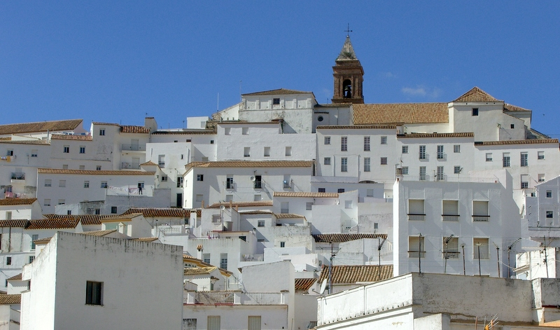 Alcalá de los Gazules, Andalucia, Spain